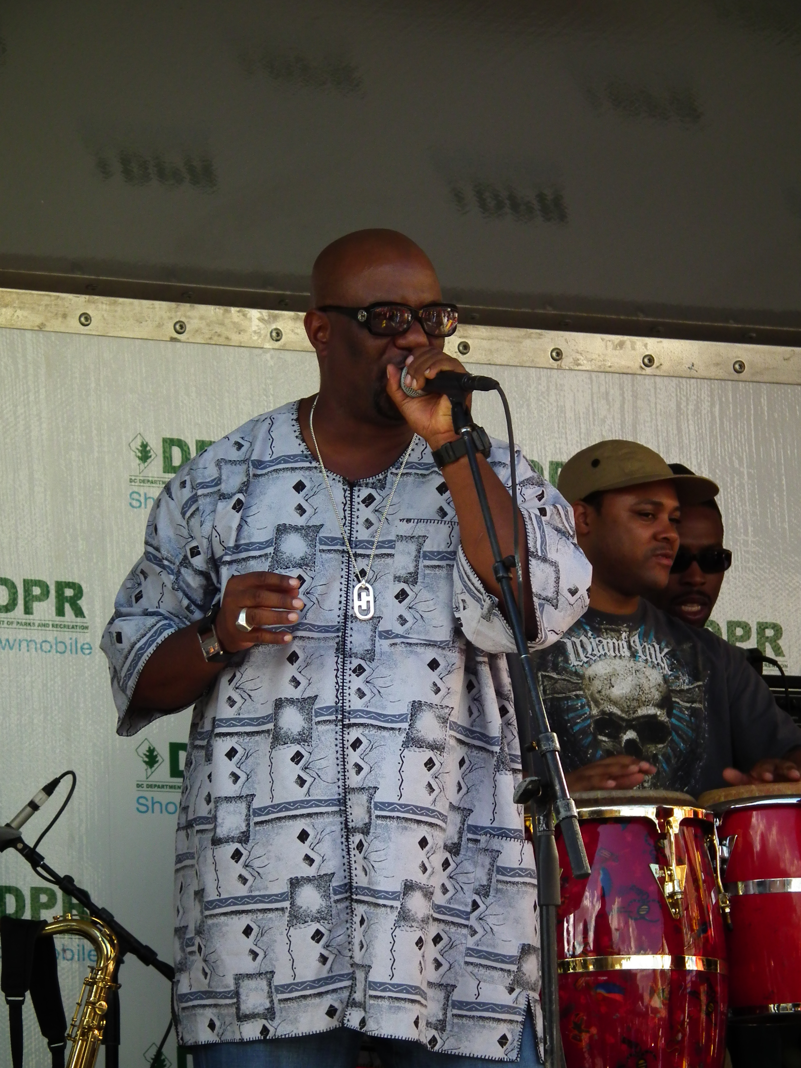 Familiar Faces